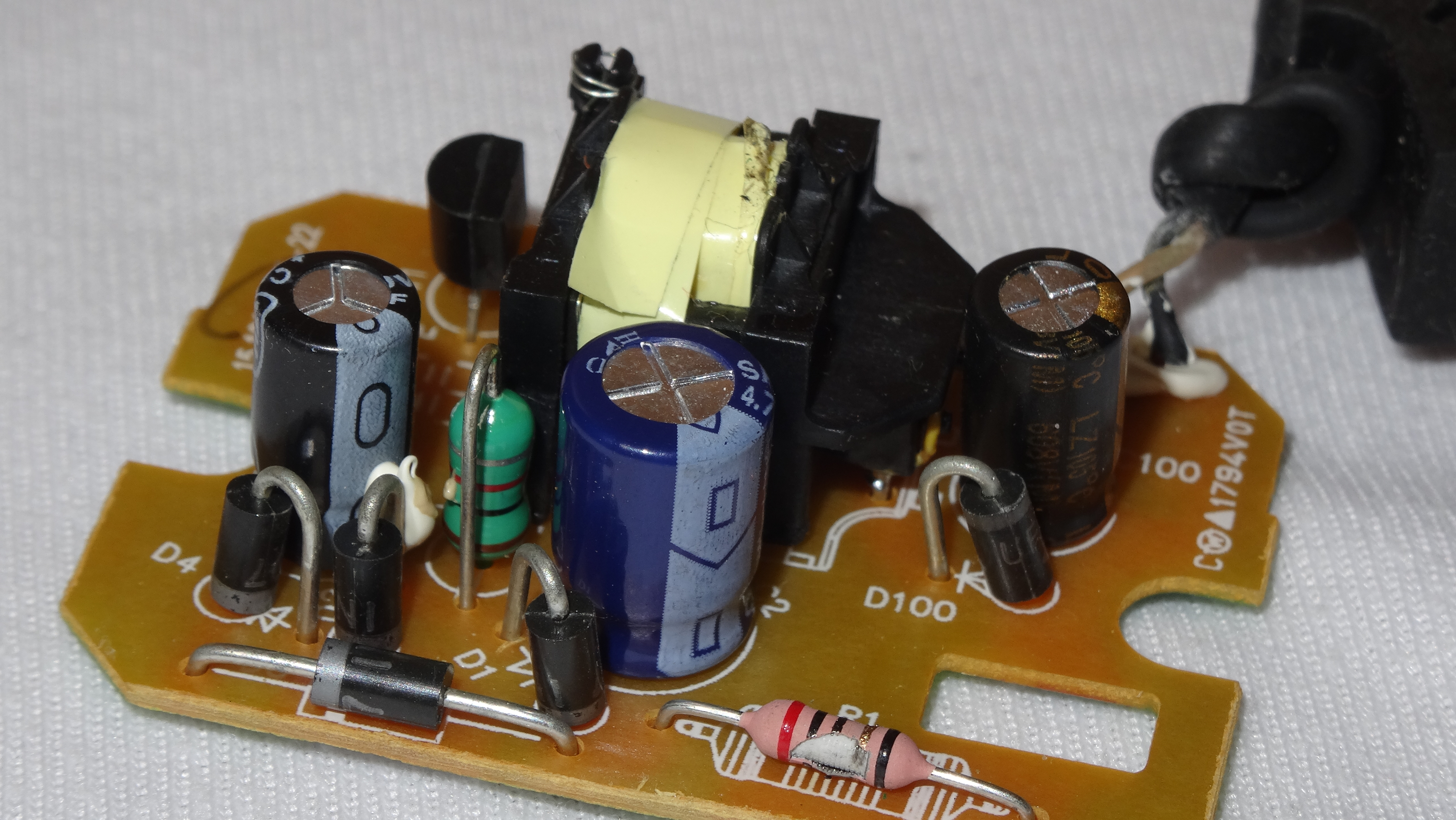 Unten rechts der defekte R1